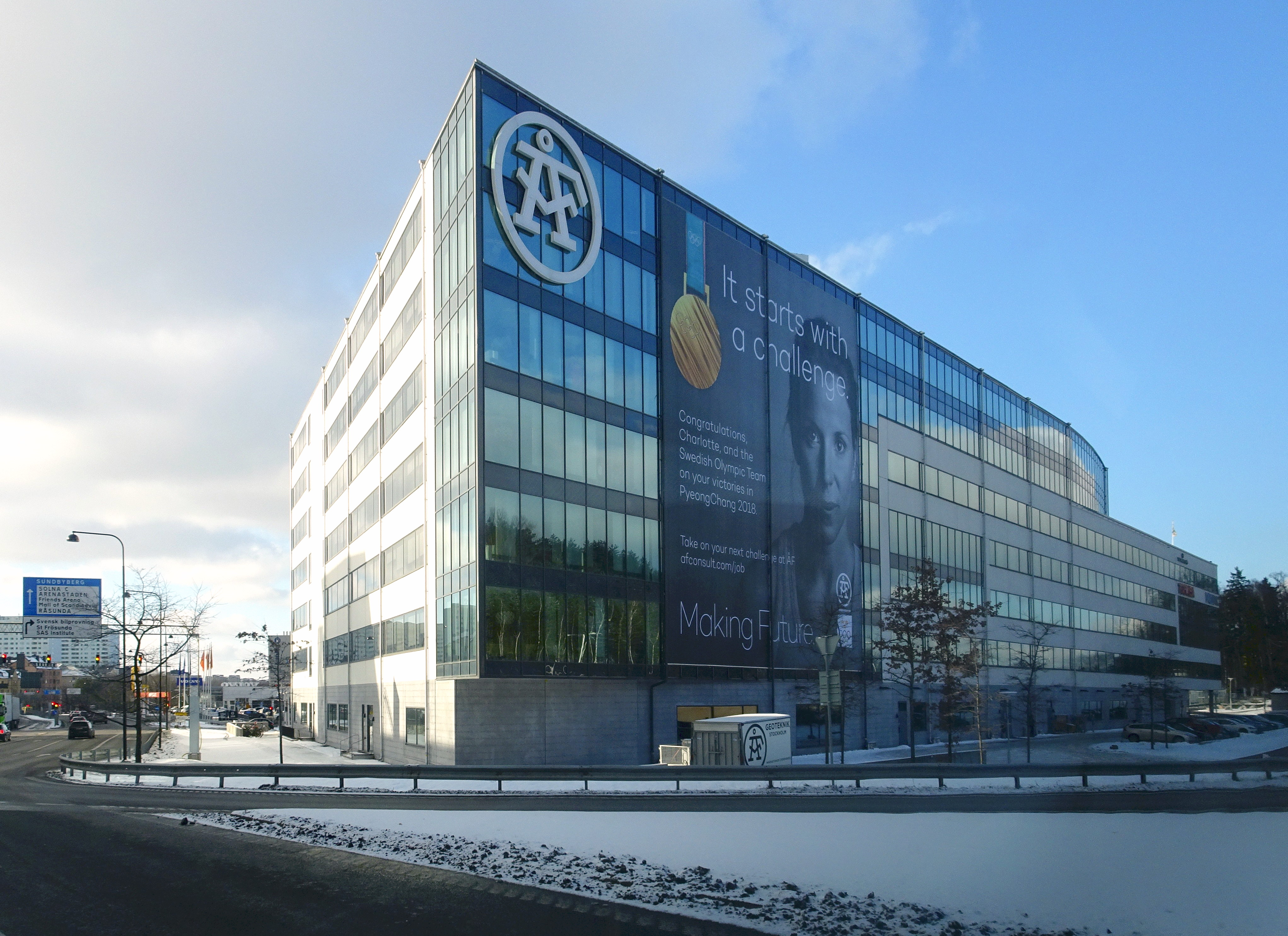 ÅFs huvudkontor på Frösundaleden